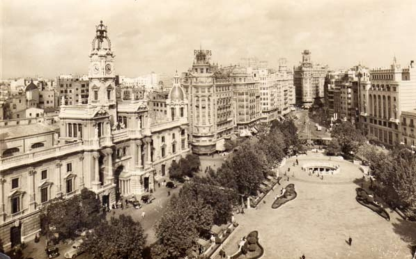 Valencia. Plaza del Ayuntamiento. La fuente indica que se tomó el 5 de agosto de 1962.